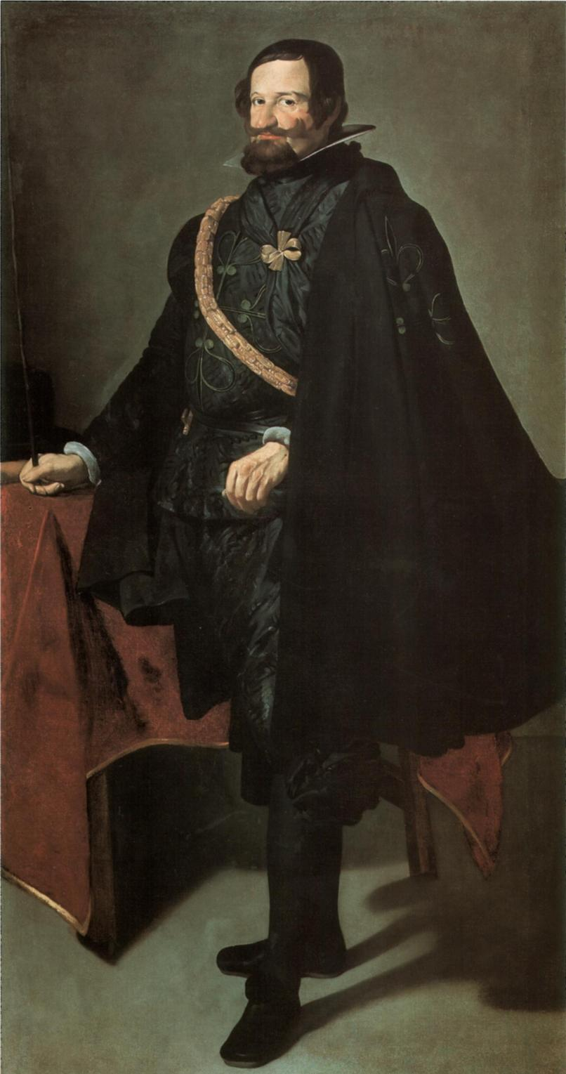 Retrato de Gaspar de Guzmán y Pimentel (1587-1645), conde-duque de Olivares y valido del rey Felipe IV de España.